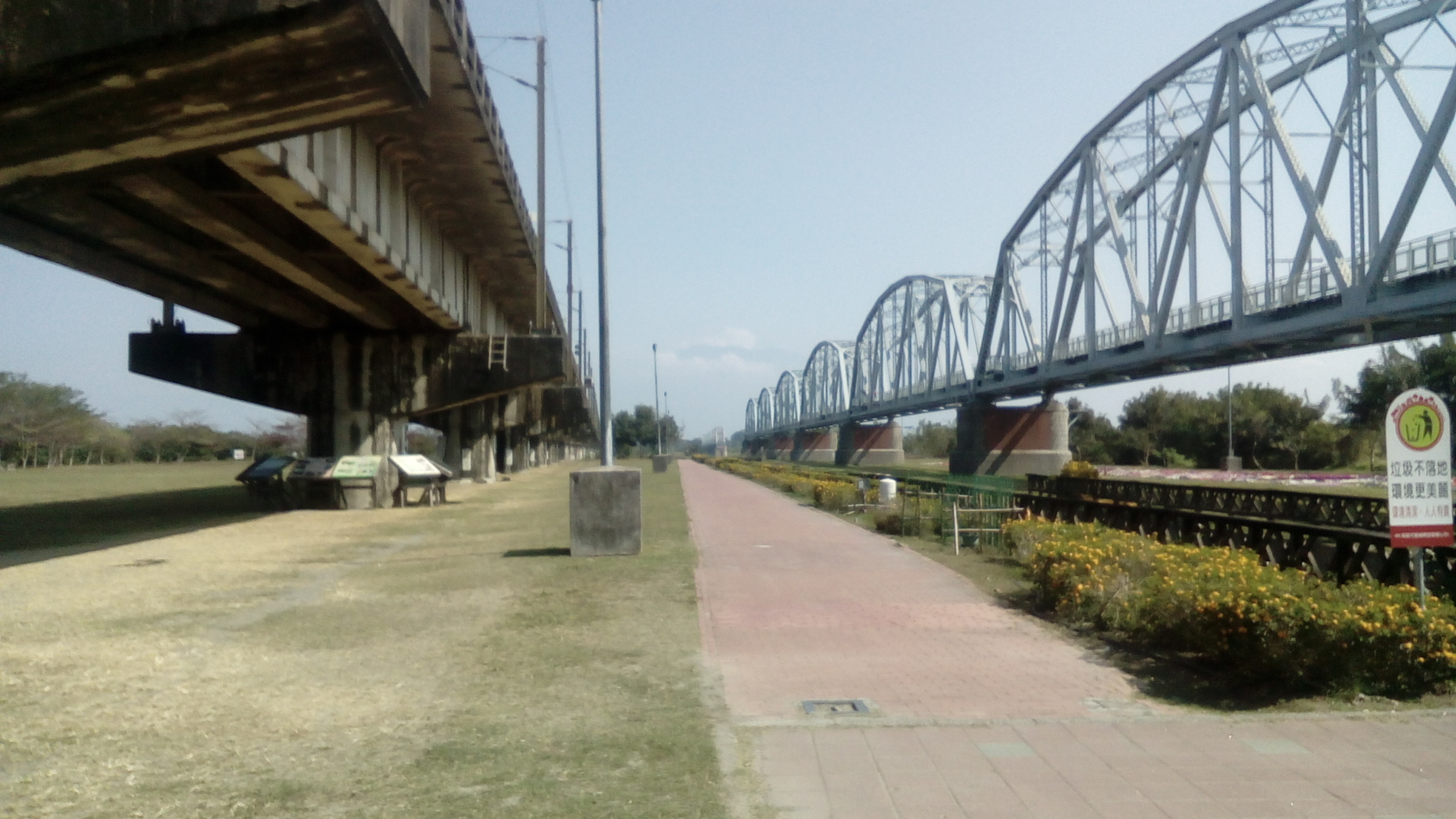 位於大樹區南部的九曲堂一帶 主打景點為日據時代舊鐵橋(已沖毀)及河濱濕地、三和瓦窯